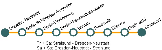 Author: BR 146 (Armin Emde) Describtion: Plan of the trainservice OstseelandExpress - Selfdrawn Autor: BR 146 (Armin Emde) Beschreibung: Netzplan der Zugverbindung OstseelandExpress - Selbstgezeichnet